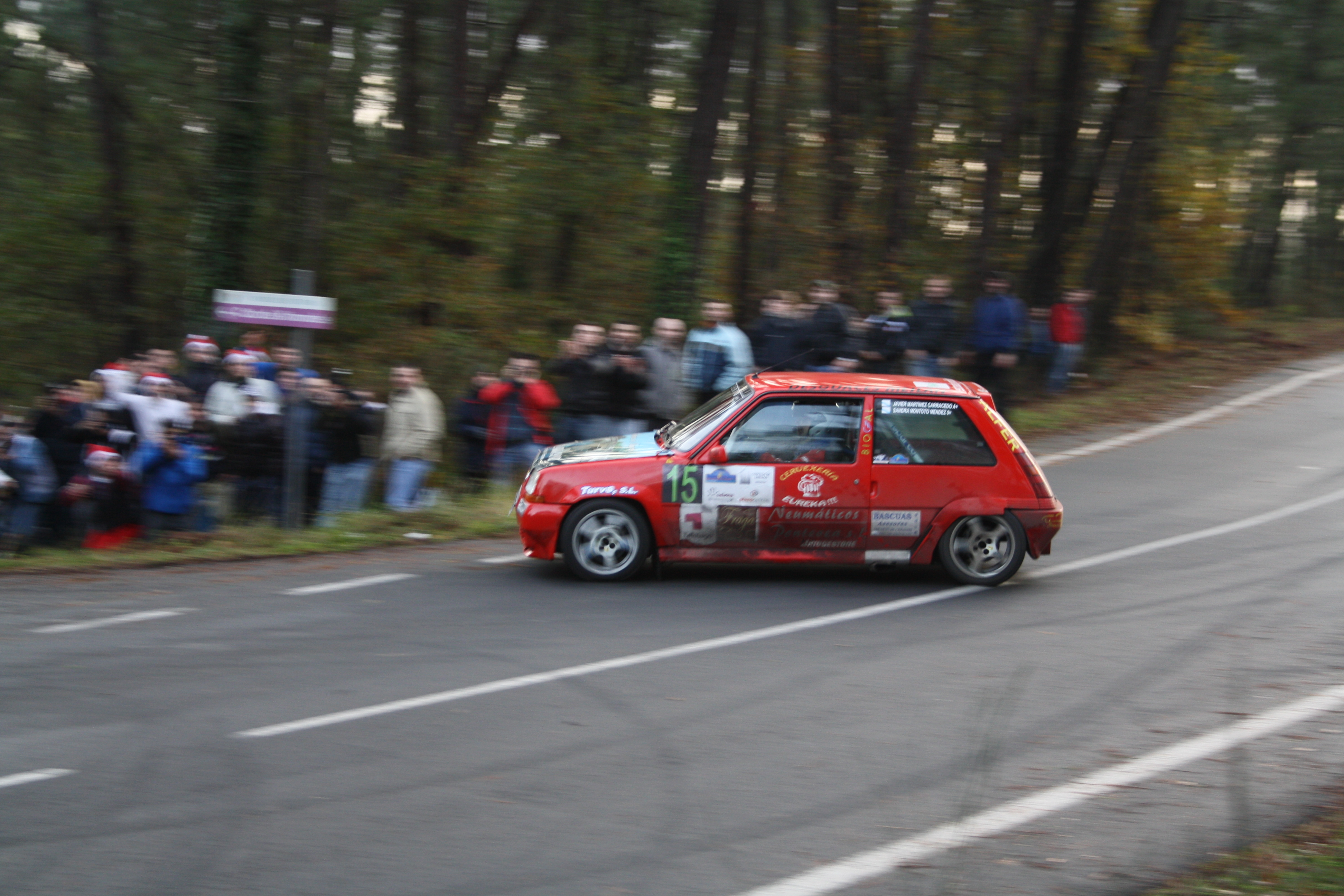 Javier Martinez Carracedo. Rally Botafumeiro 2011